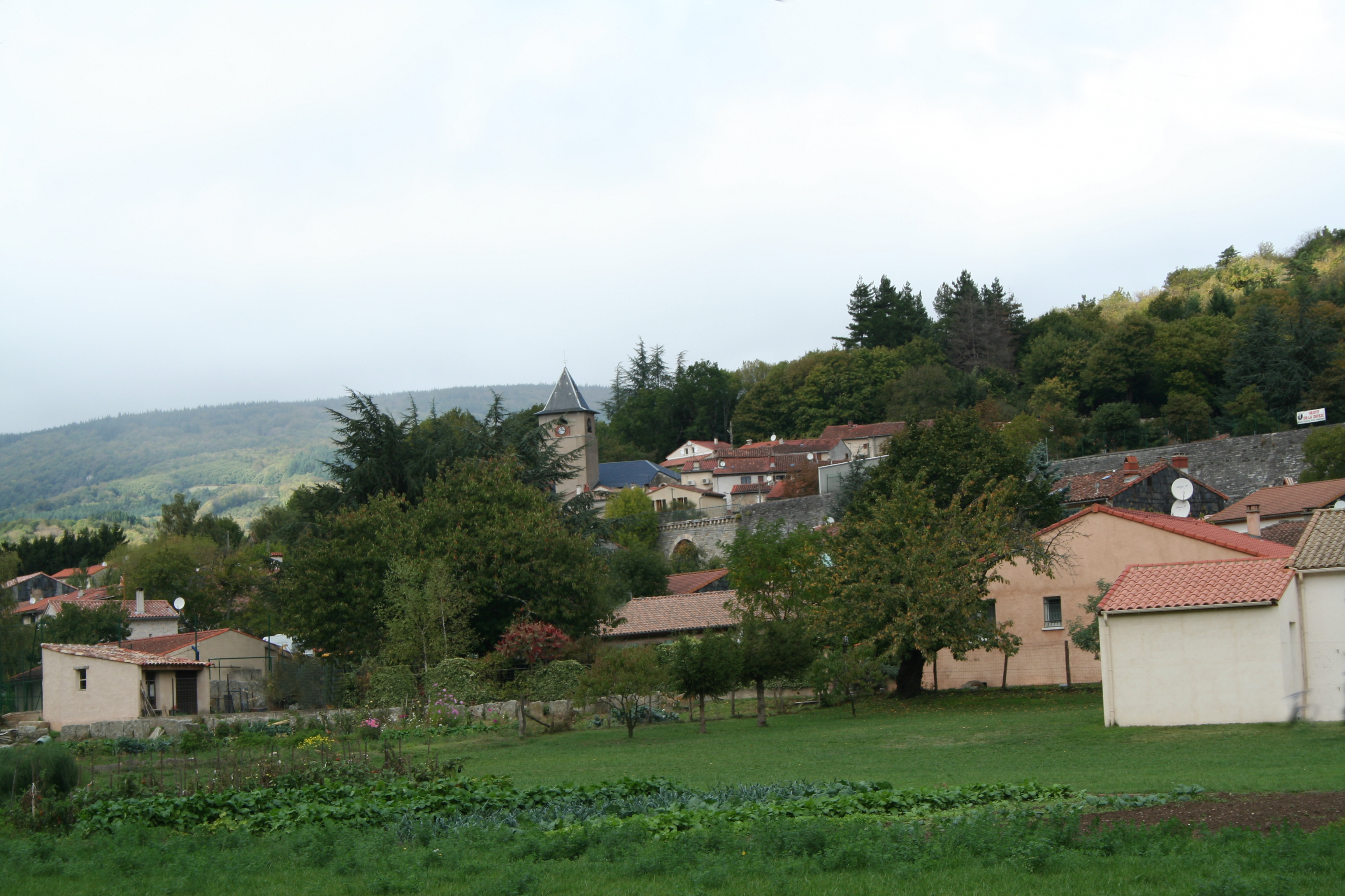 Courniou (Hérault) - vue.